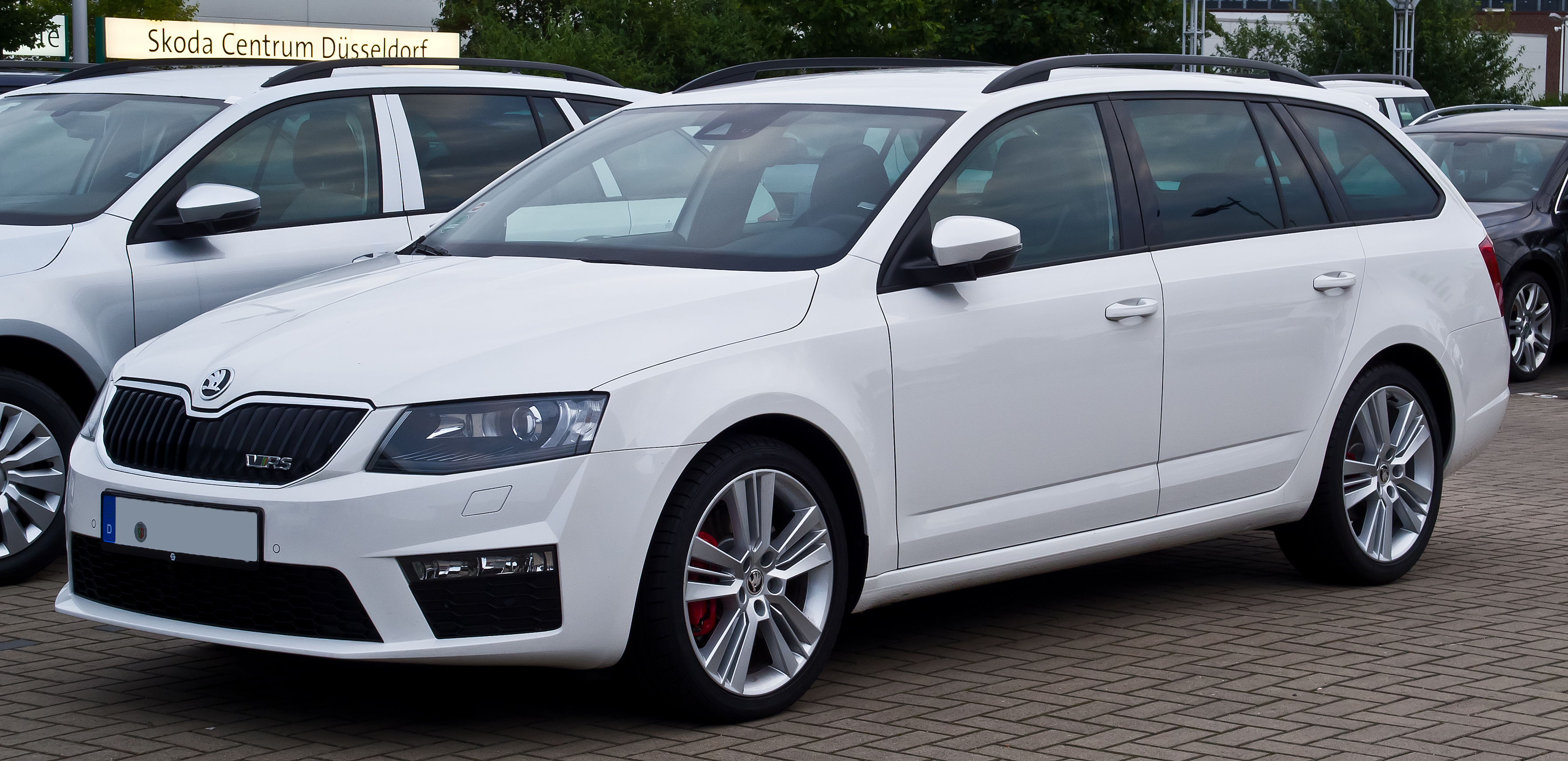 Skoda Octavia Combi RS (III)